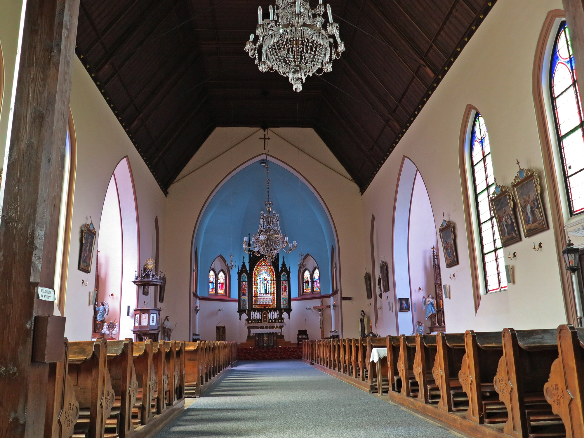 Kostel svatého Antonína Paduánského, Melč.